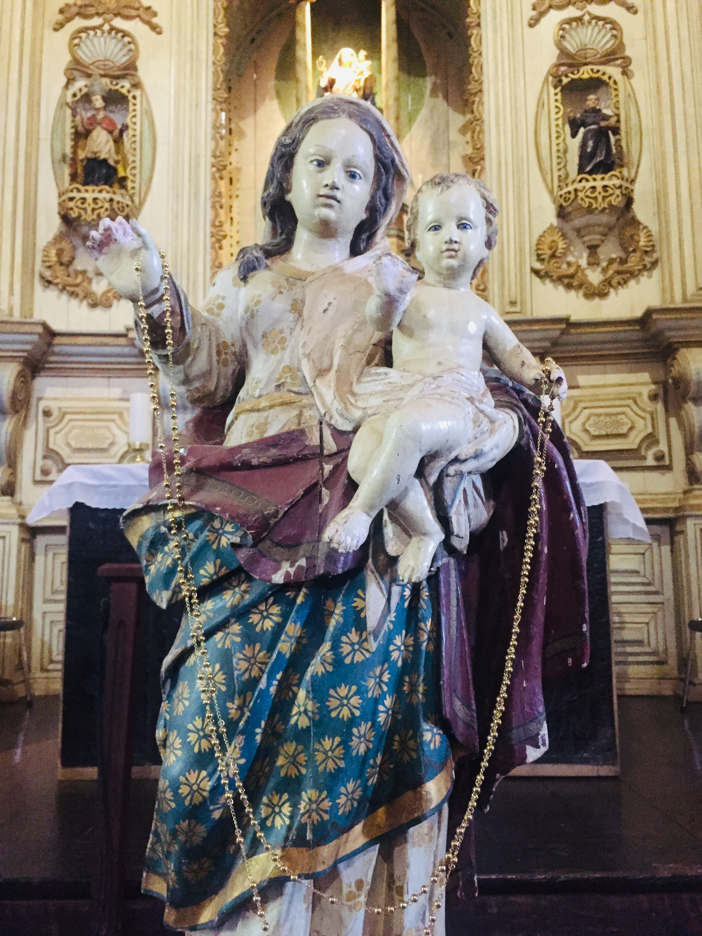 Imagem de Nossa Senhora do Rosário, padroeira da extinta Irmandade e Igreja Nossa Senhora do Rosário dos Pretos de Pirenópolis